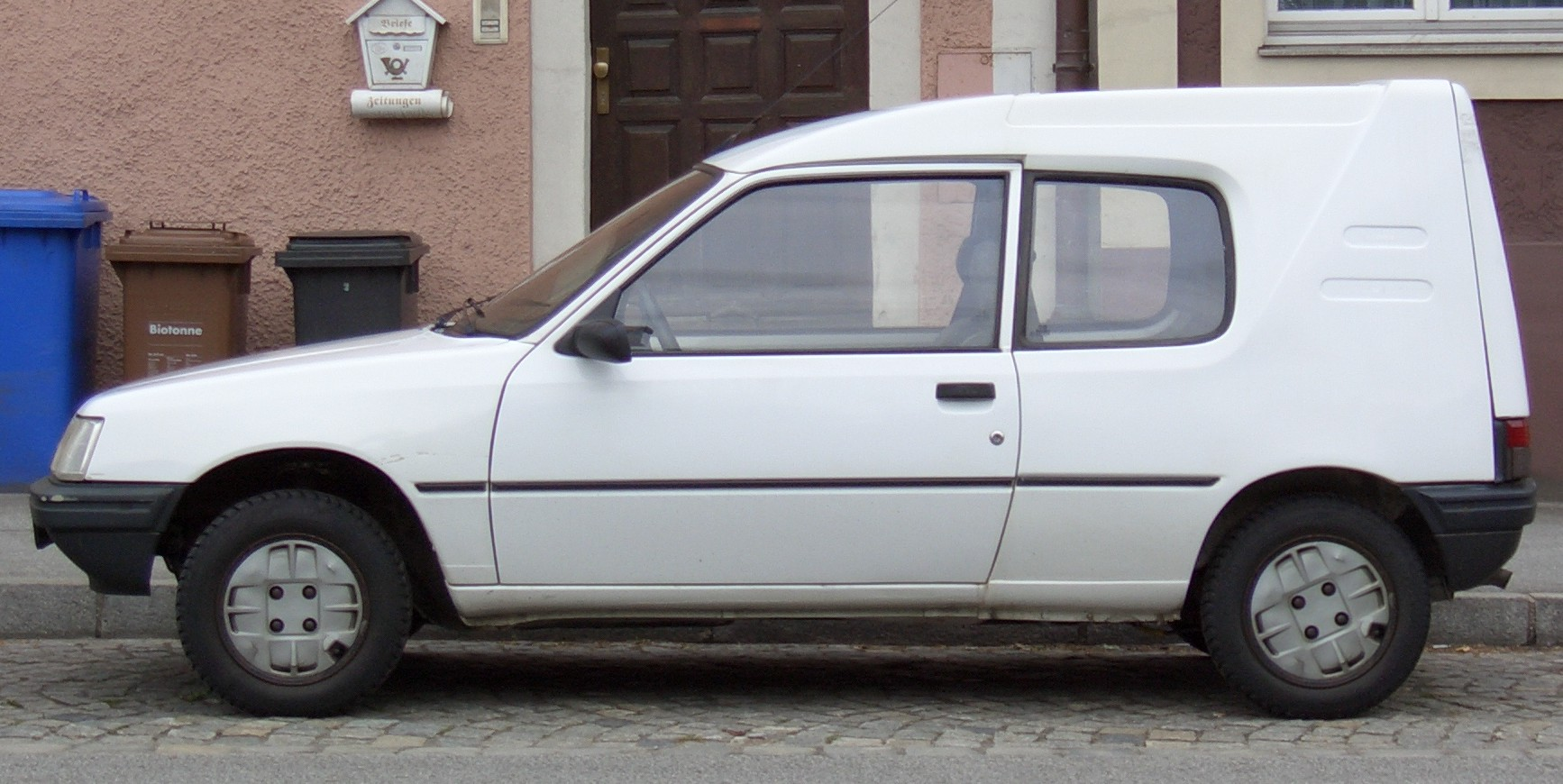 Peugeot 205 Sonderkarosserie Multi des Karosseriebauers Durisotti, Baujahr 1994. Kosmetische Korrektur: fehlende Radabdeckung wurde von vorn nach hinten kopiert. Radabdeckungen entsprechen nicht der ab 1990 serienmäßigen Version.